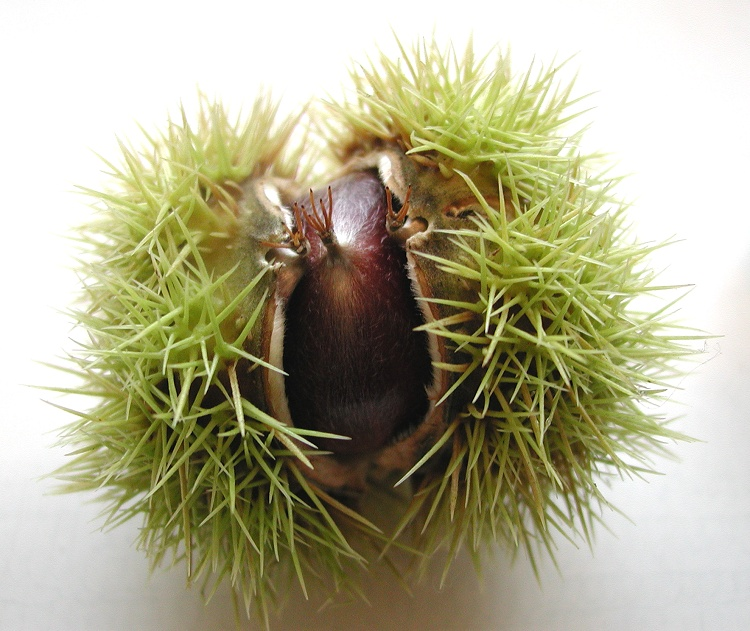 Castanea sativa - Edelkastanie (Maroni)